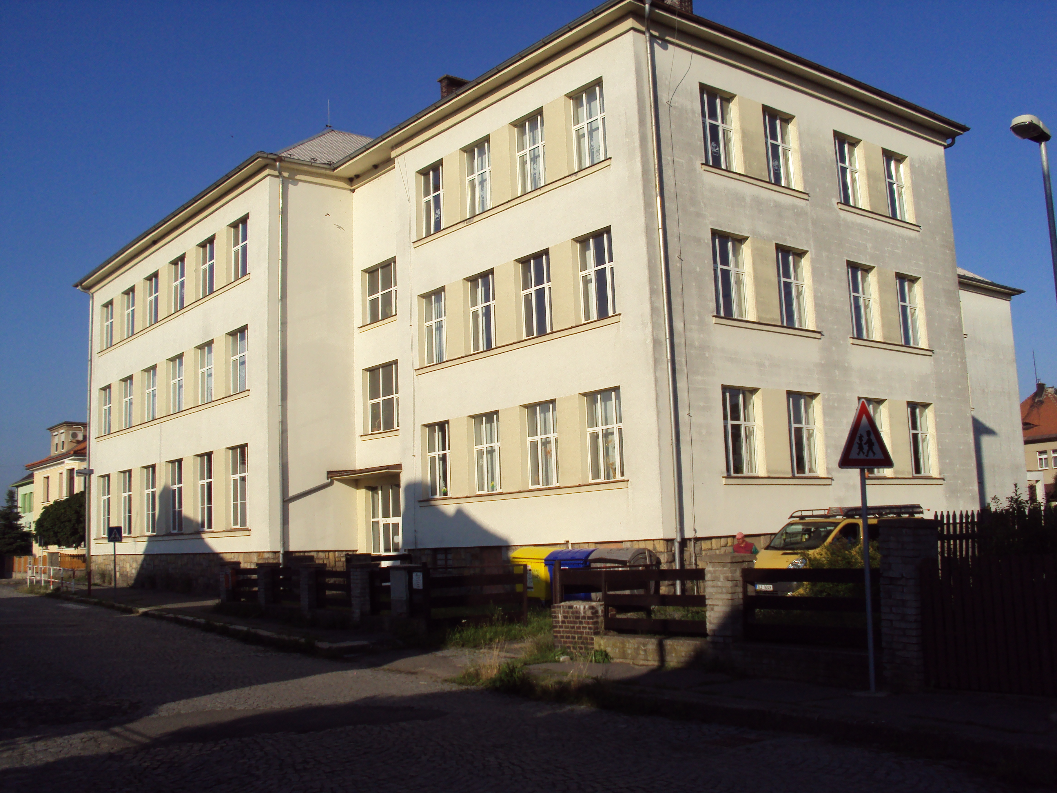 Základní škola, ul.Komenského v Mimoni